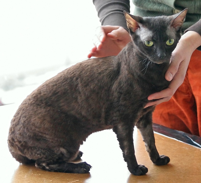 Femelle german rex présentée en exposition féline à Seinäjoki. CH Saxonys-Charlotta vom Batu (Lotti) [GRX b] female EX1 CAC CH